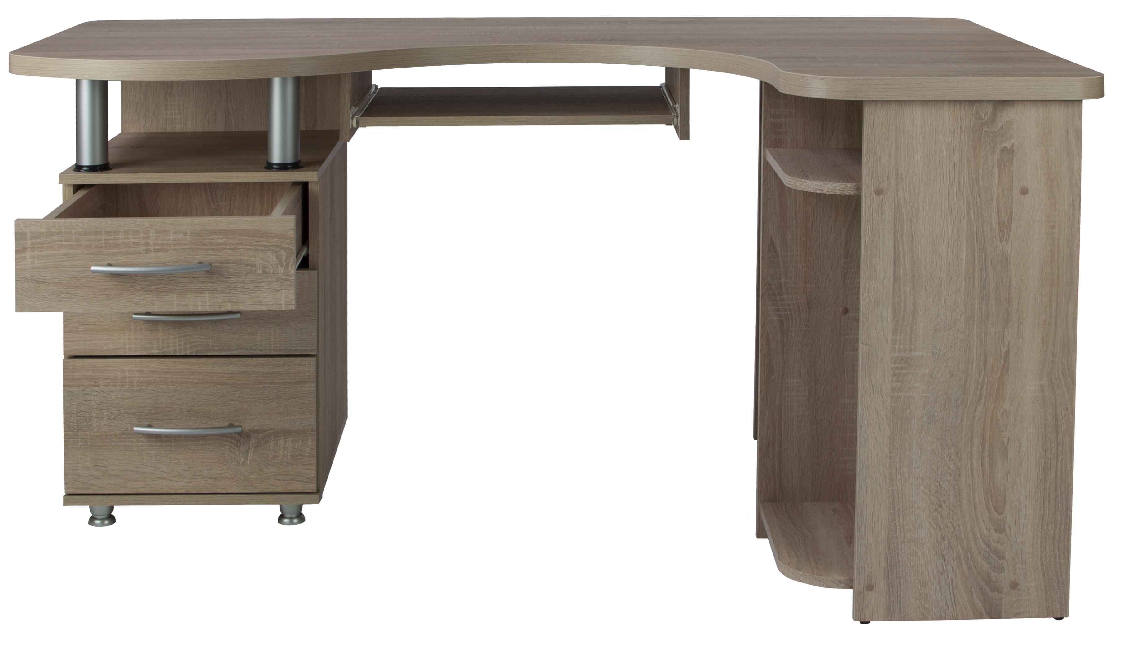 Nowoczesne biurko narożne